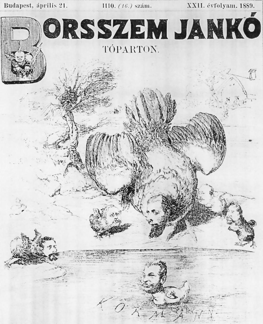 Forrás: Borsszem Jankó, 1889. április 21. Az eredeti kép alatt felirat olvasható: "A kotlós tyúk panaszosan nézi az ő hűtlen kacsa-fiát, aki vigan uszkál a vizben." A kotlós tyúk Apponyi Albert, a Mérsékelt Ellenzék vezére. A kacsa-fiú Szilágyi Dezső, aki a "KORMÁNY" feliratú tóban úszkál.